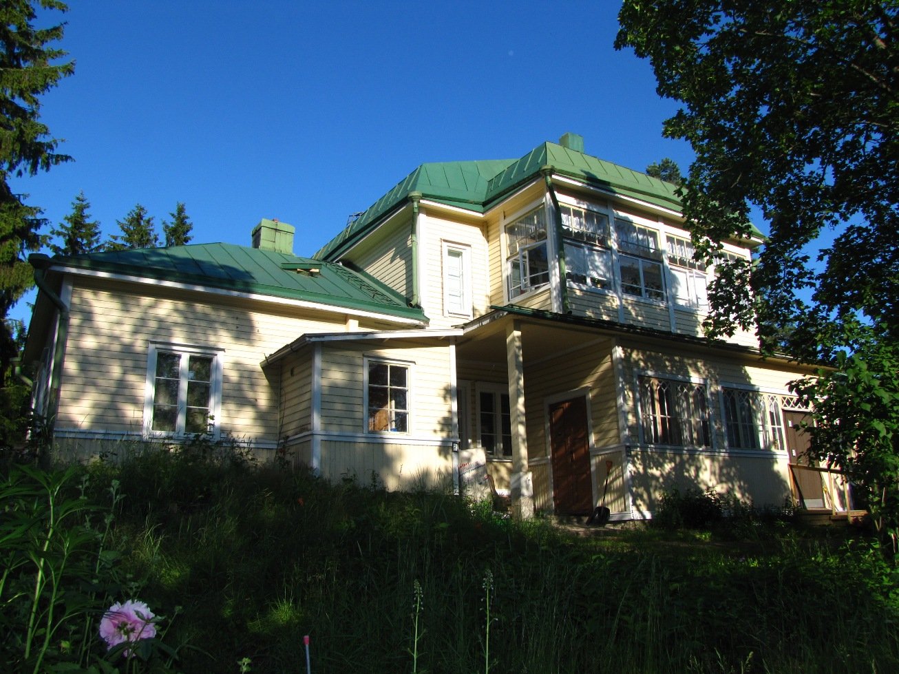 Yli-Jaakkolan päärakennus vuodelta 1870 eli "Lindellin talo" toimii yhä asuinrakennuksena